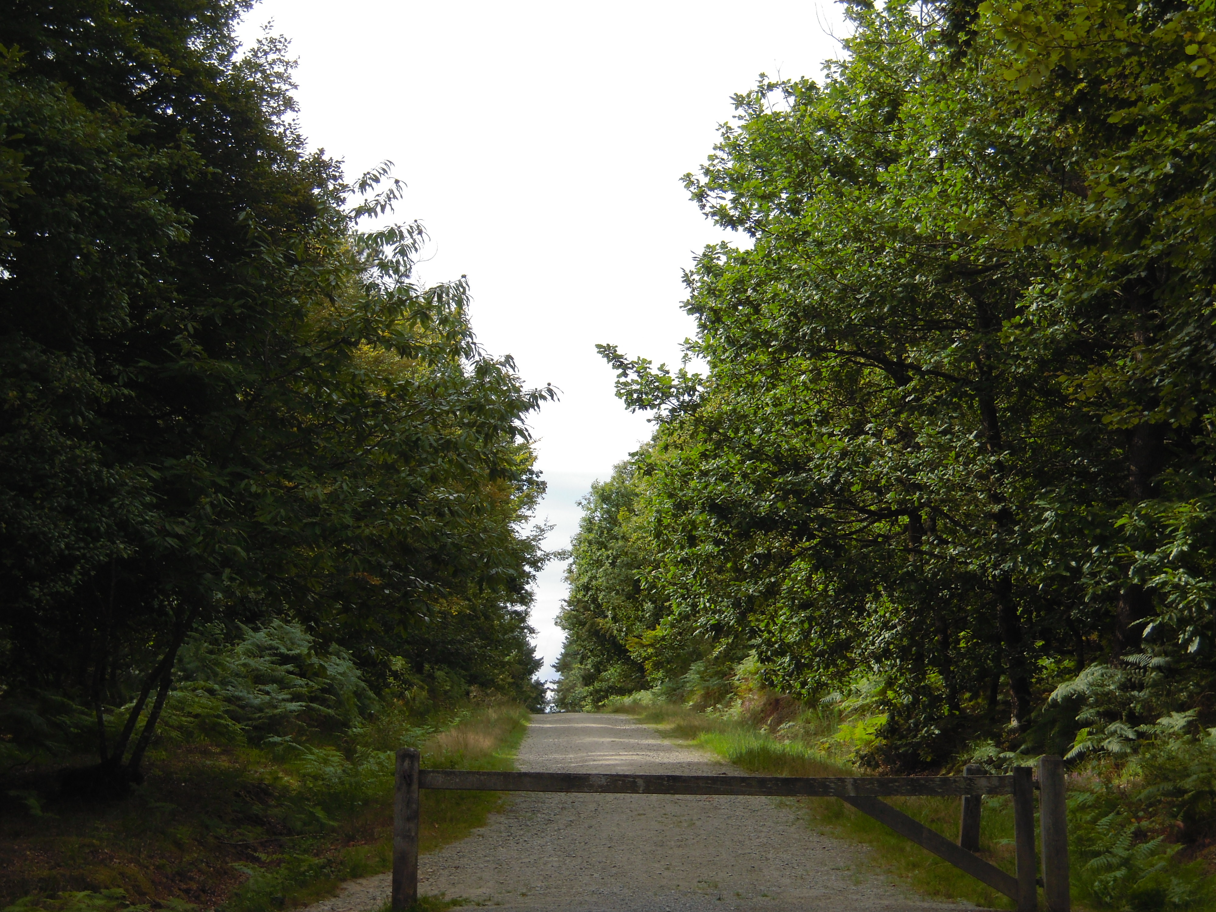 Foret de la Corbière à Châteaubourg